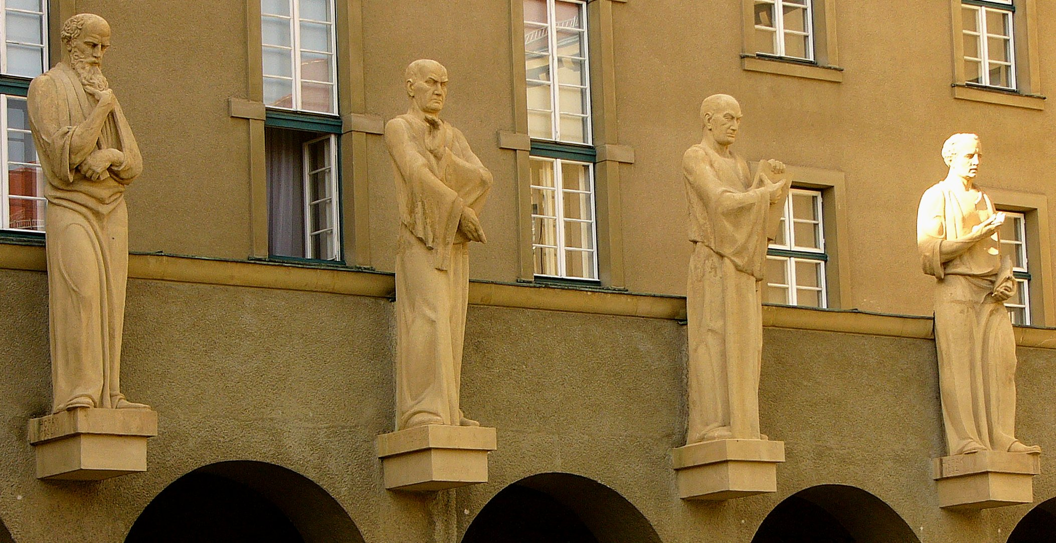 Steinfiguren über dem Eingang ins Gerichtsgebäude in Krems.